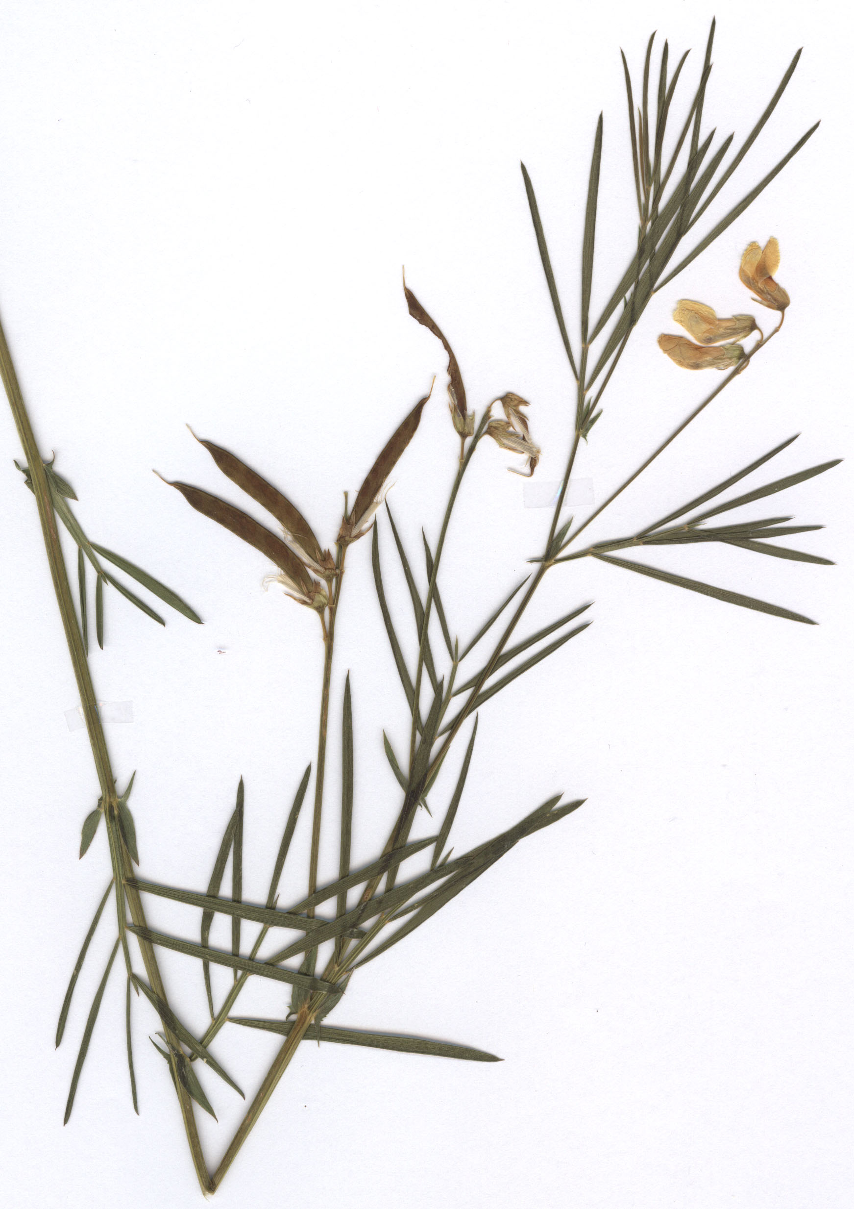 Lathyrus pannonicus, eigener Herbarbeleg vom 14.5.1980 - Fundort: Schwäbische Alb (exakter Fundort wurde retuschiert zum Schutz des Standorts) – Hinweis: Das Sammeln bzw. Herbarisieren dieser Art ist nach der aktuellen Bundesartenschutzverordnung in Deutschland streng verboten und kann mit empfindlichen Geldstrafen geahndet werden.